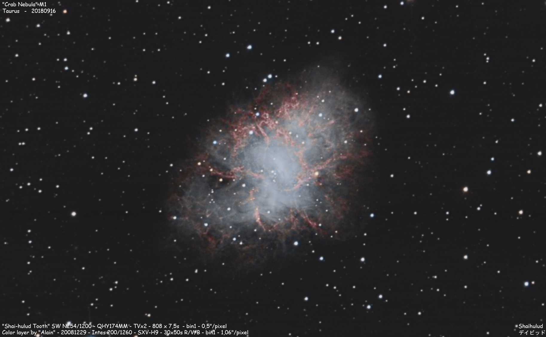 "Crab Nebula" M1